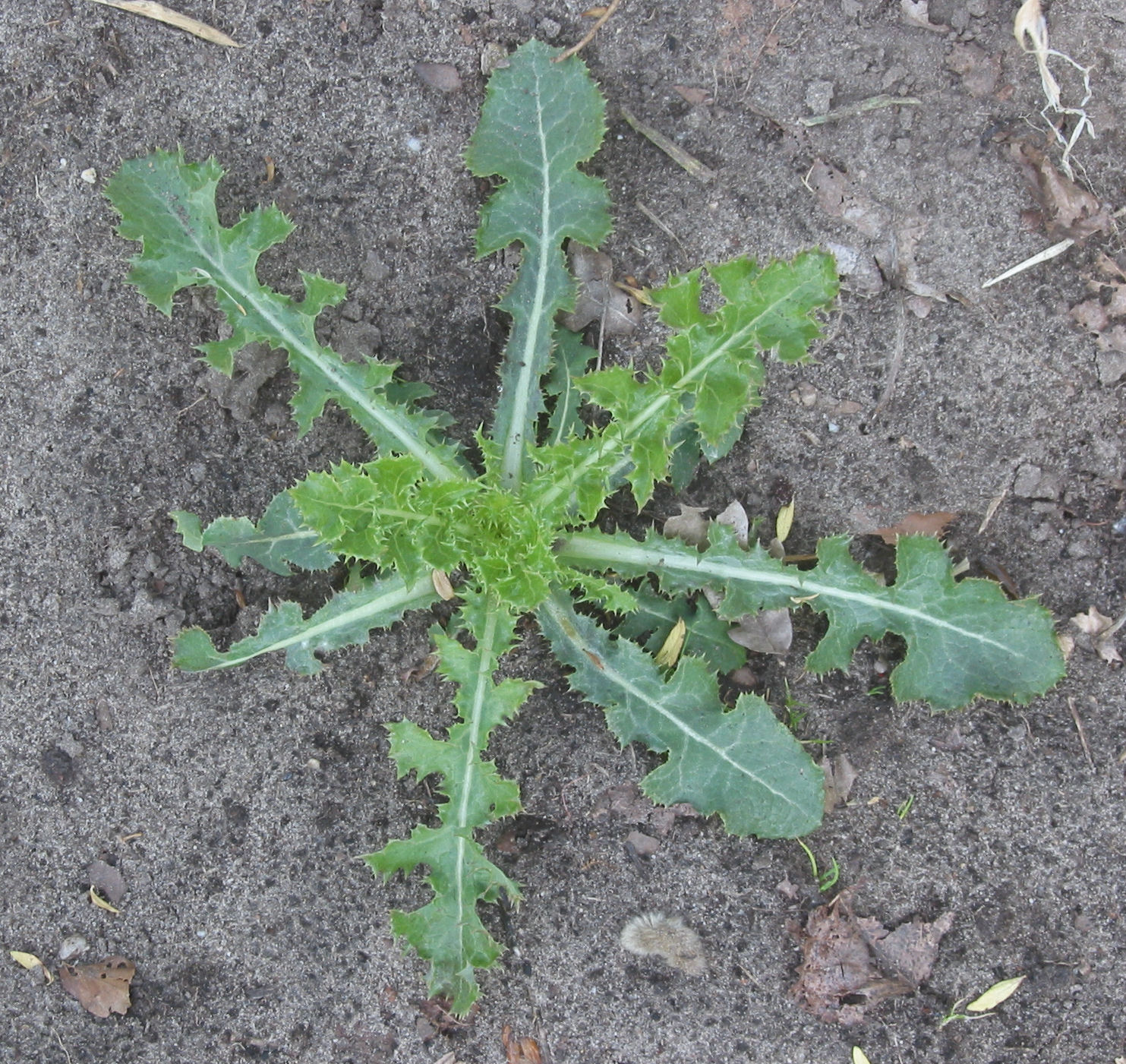 NOT (nl: Gewone melkdistel bladrozet) Sonchus oleraceus